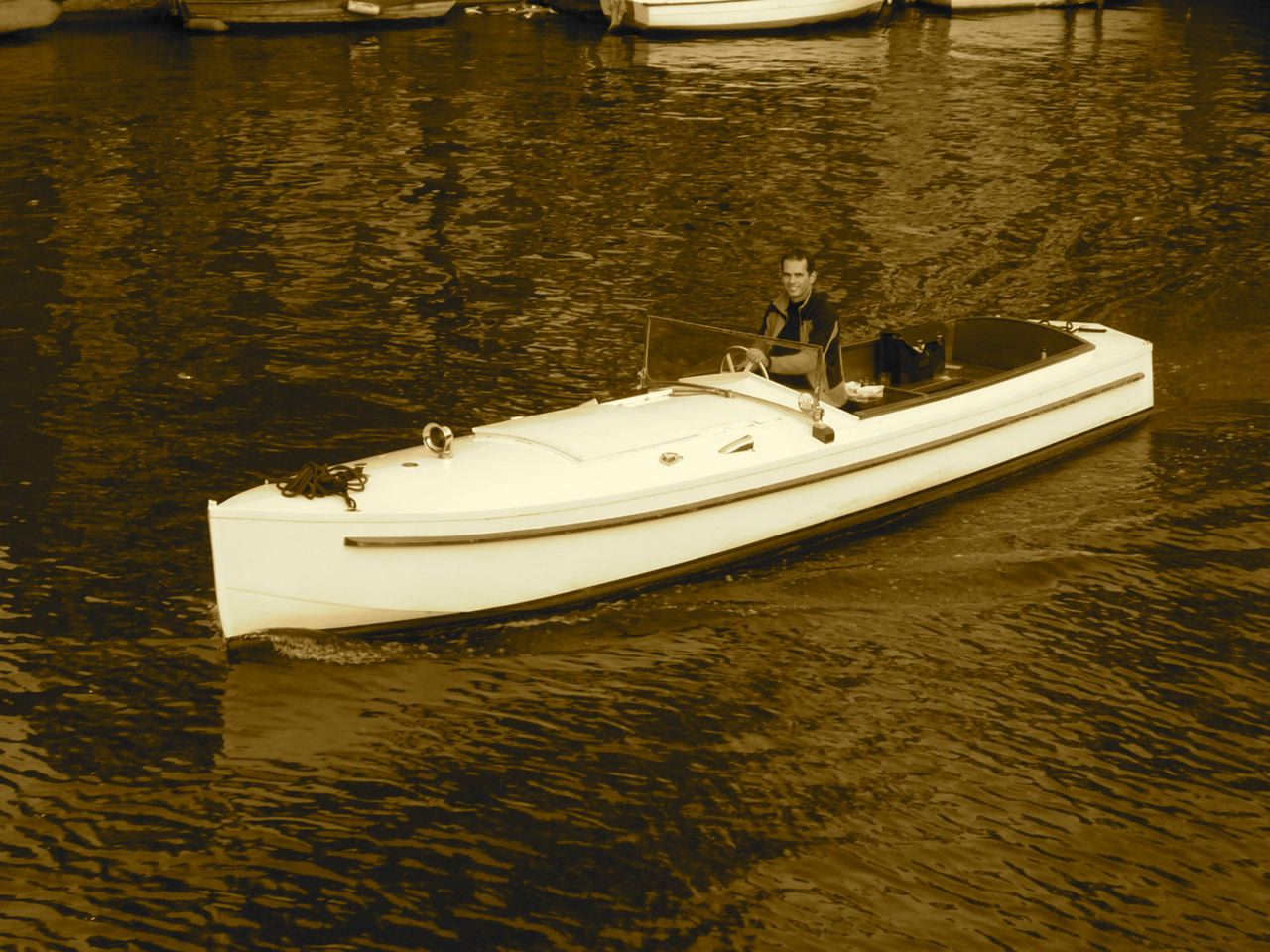 de Vries Lentsch Amsterdam